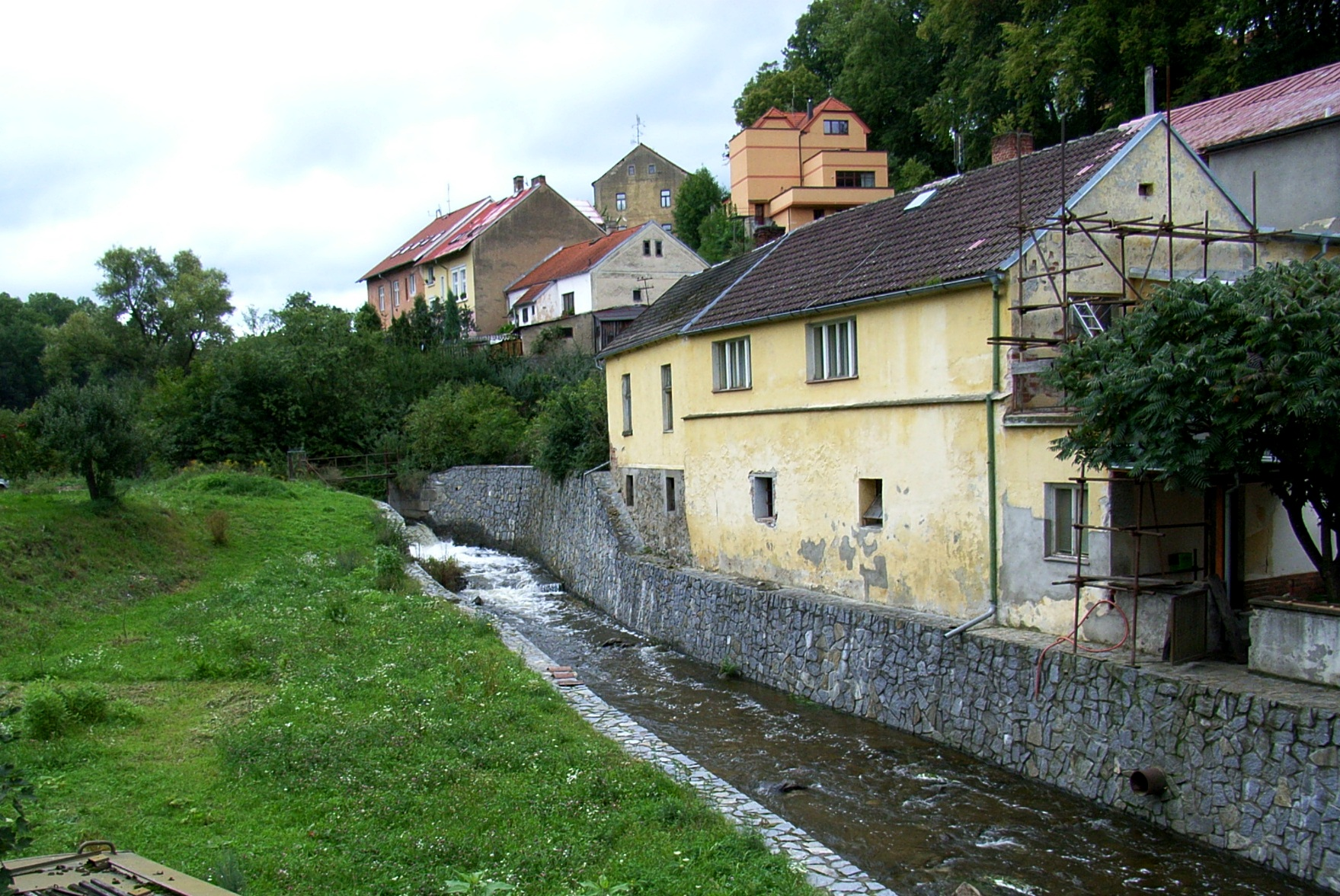 Potok protéká pod hradbami a městskými sady